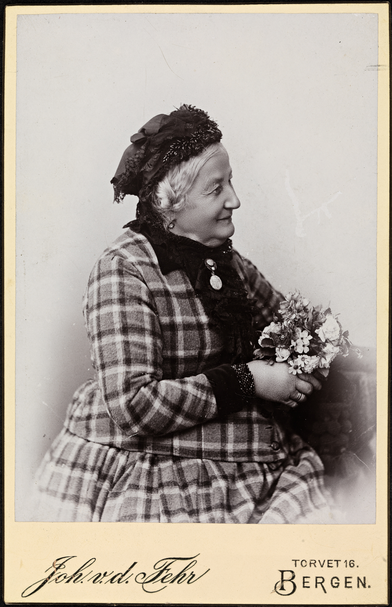 Tittel / Title: Portrett av en eldre, uidentifisert kvinne med blomsterbukett Beskrivelse / Description: Kabinettkort. Dato / Date: ukjent / unknown Fotograf / Photographer: Joh. v. d. Fehr (Bergen) Sted / Place: Hordaland, Bergen Eier / Owner Institution: Nasjonalbiblioteket / National Library of Norway Lenke / Link: Bildesignatur / Image Number: blds_05787